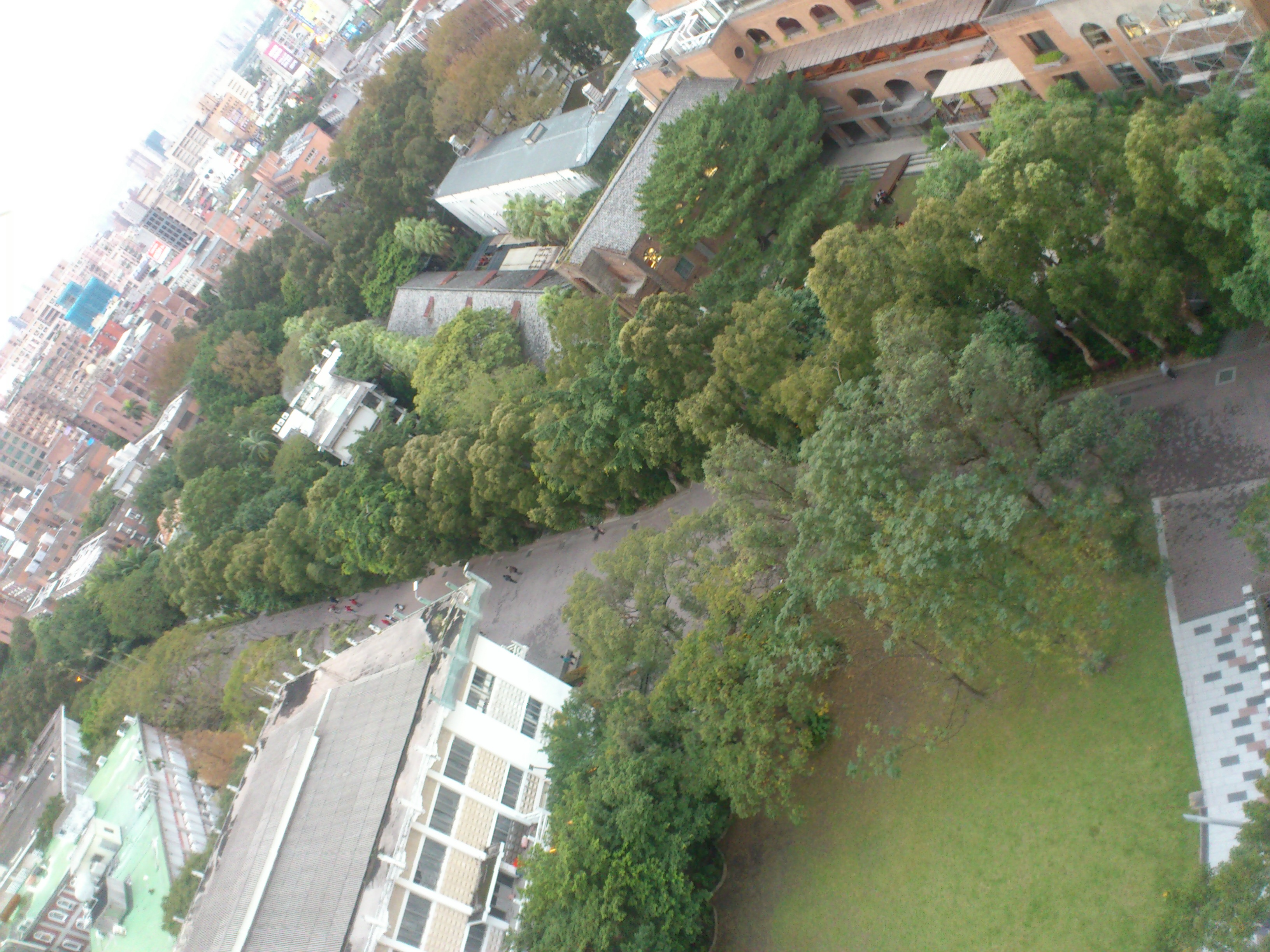 舟山路 (台北)俯瞰